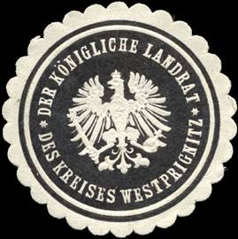 Sealing stamp Title: Der königliche Landrat des Kreises Westprignitz Description: geprägt, schwarz, weiß Place: size: 4 cm